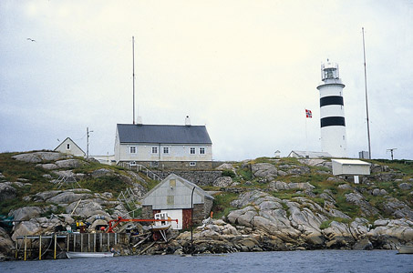 haltenfyr